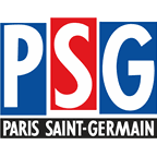 Hidtorisches Logo